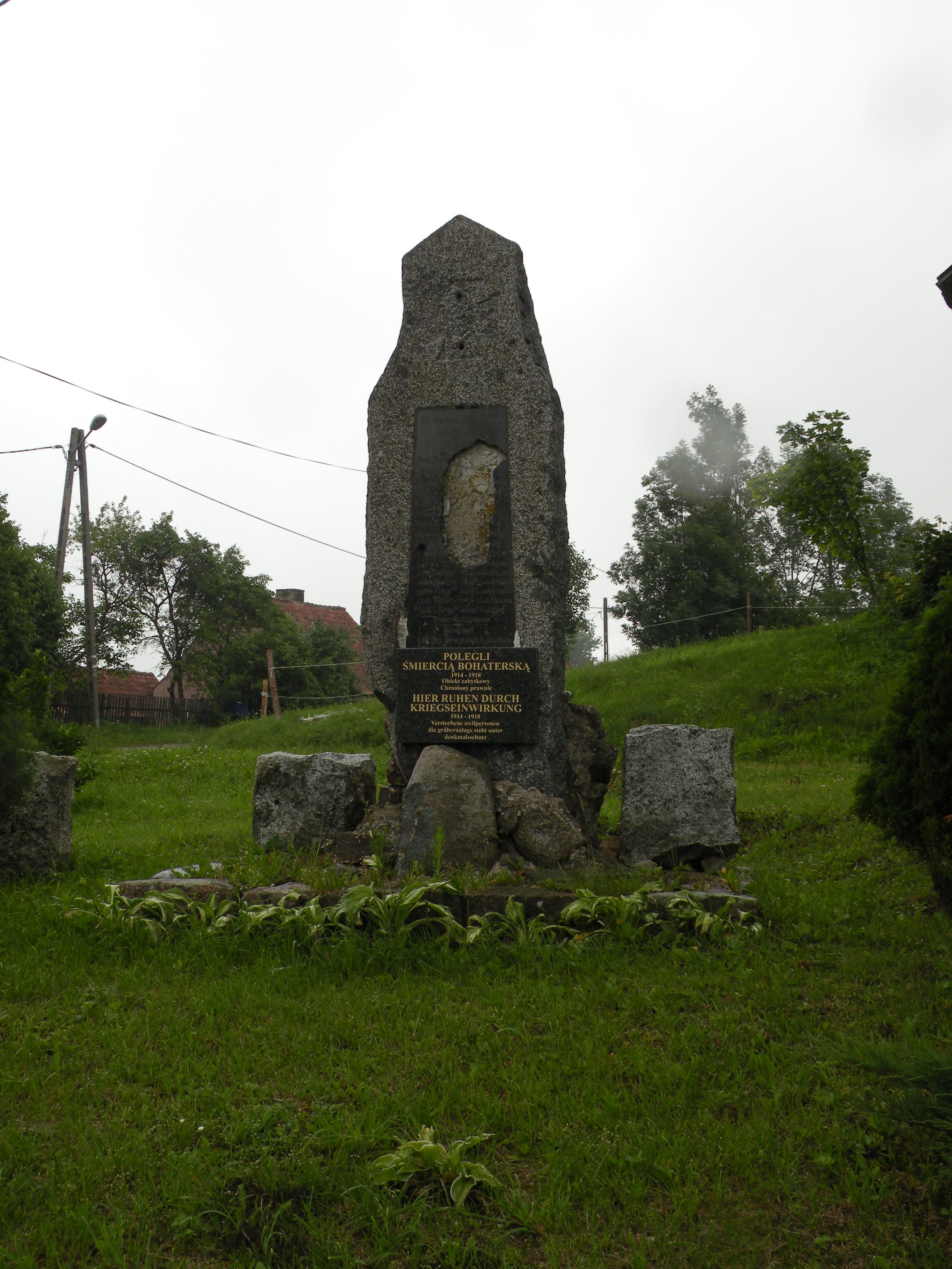 Kabiny - cmentarz wojenny z I wojny światowej